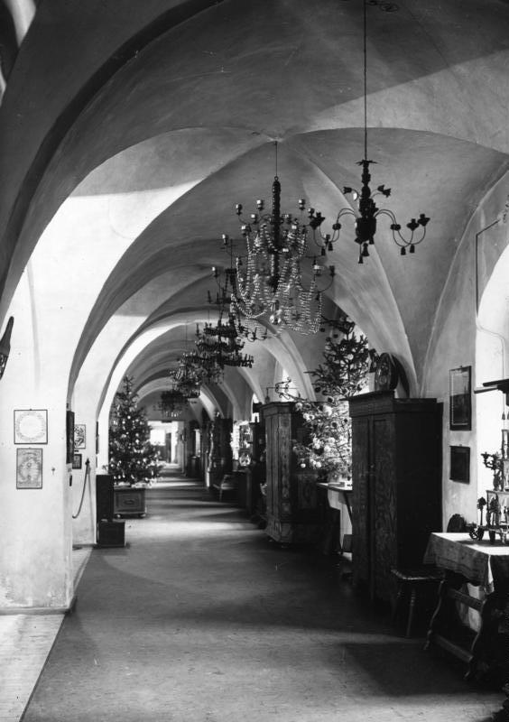 Aufnahme 1931 Dresden Seyffert-Museum: Blick in den Gang des Erdgeschosses. Überall stehen die geschmückten Bäume, von der Decke hängen die bunten "Bergspinnen"